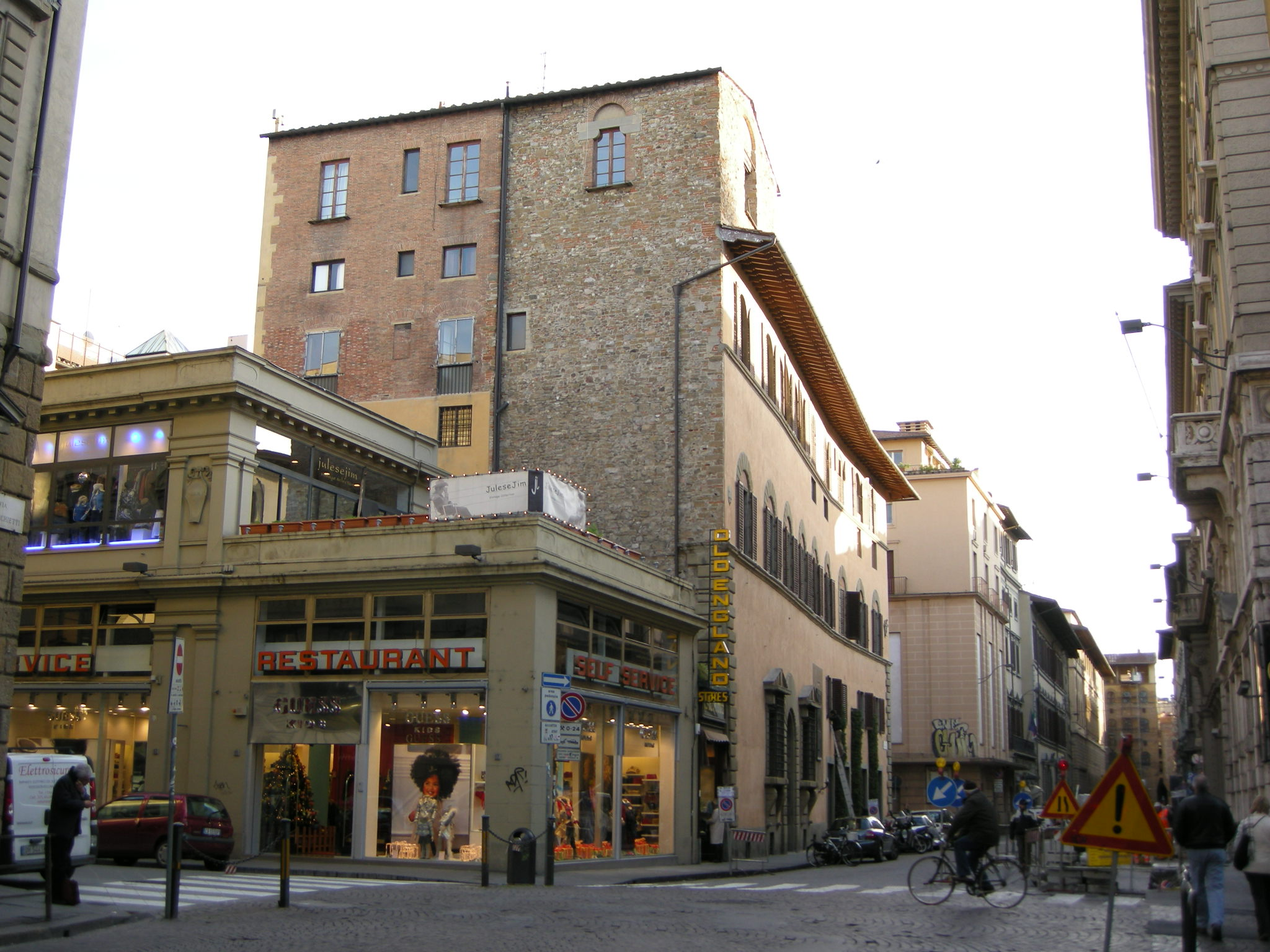 Torre degli agli